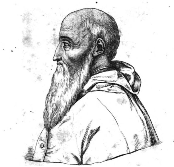 Ritratto del Cardinale Pietro Bembo